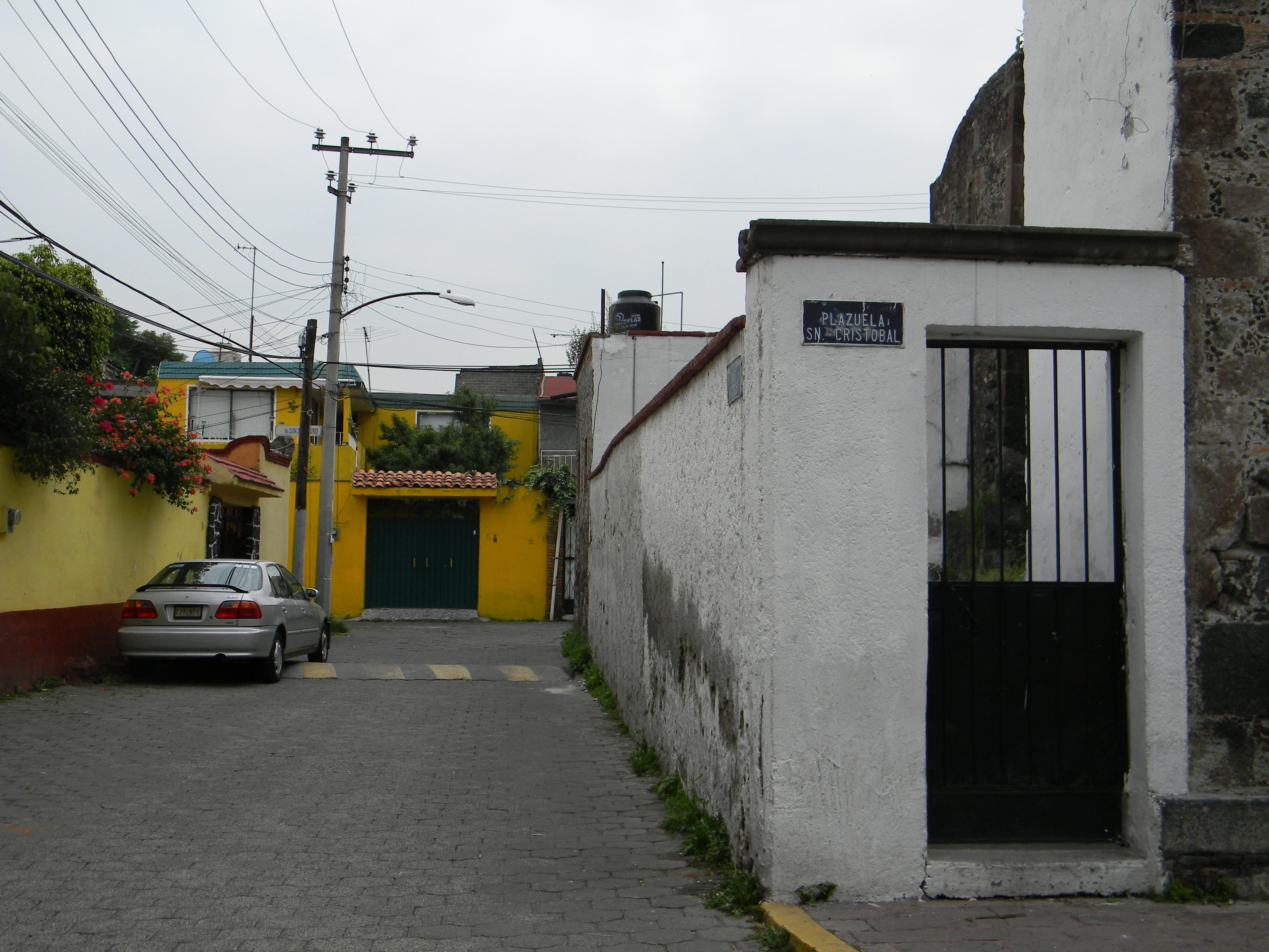 Calle aledaña a la Capilla de San Cristóbal, donde se aprecian dos casas con construcción típica de la región y un auto, está ubicada en el Barrio de San Cristóbal Xallan, Xochimilco, Ciudad de México.